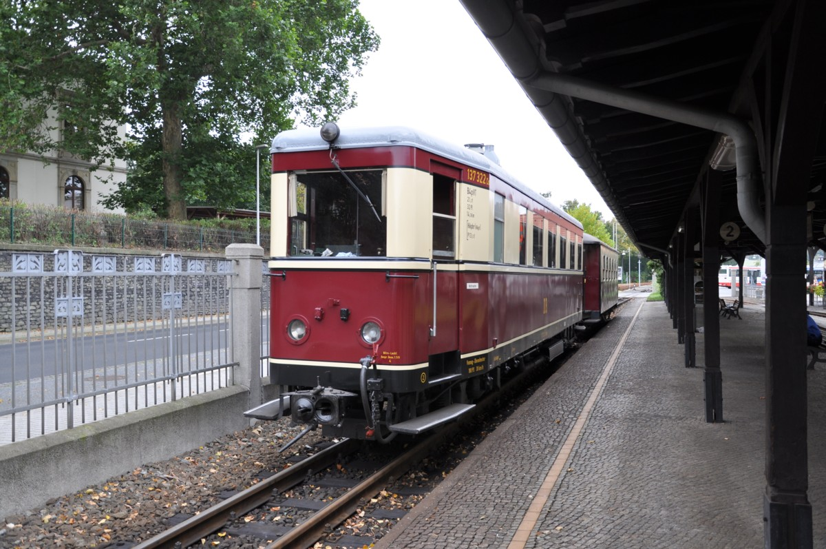 Triebwagen 137 122 in Zittau, Zittauer Schmalspurbahn